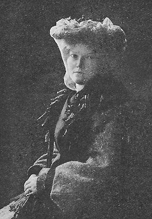 Cally Monrad (1879-1950)